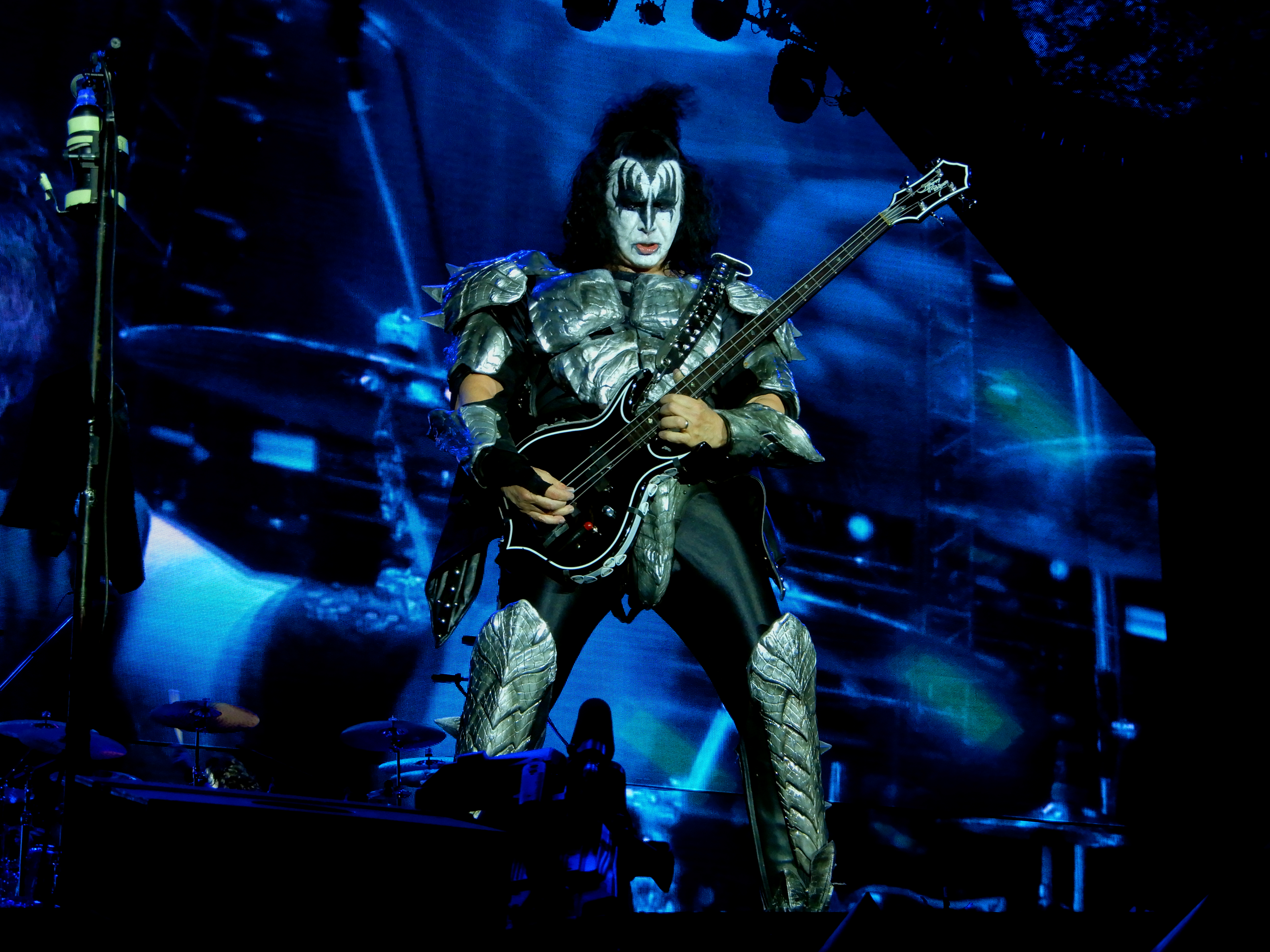 Gene Simmons au Hellfest 2019